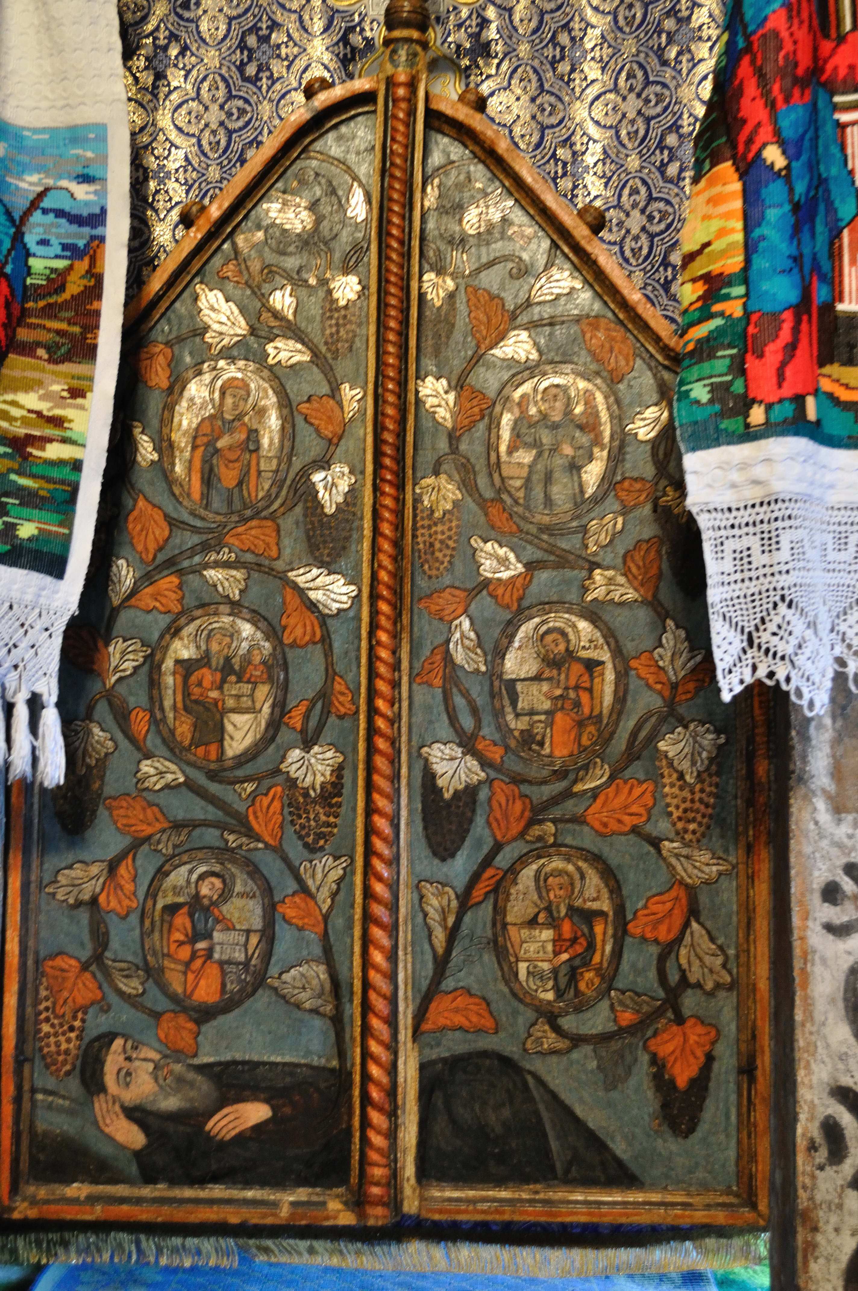 Biserica de lemn din Budești-Josani, județul Maramureș